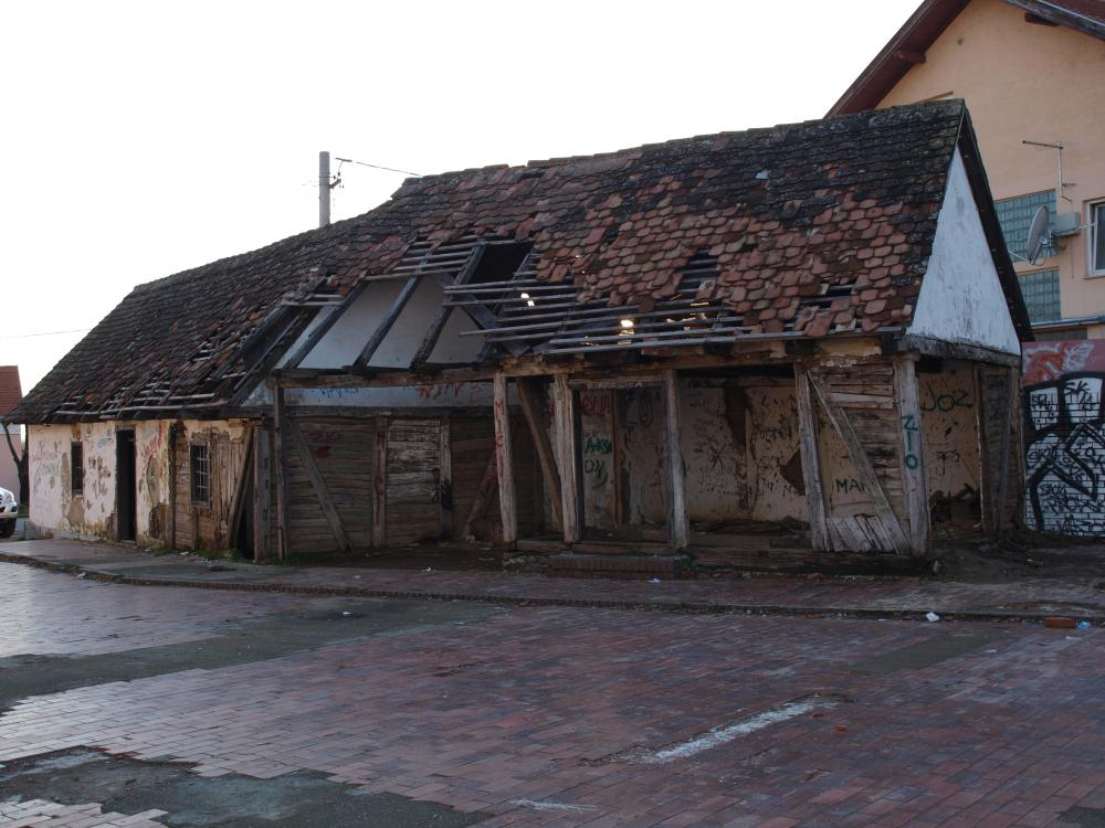 Rodna kuća Đure Đakovića u Slavonskome Brodu.